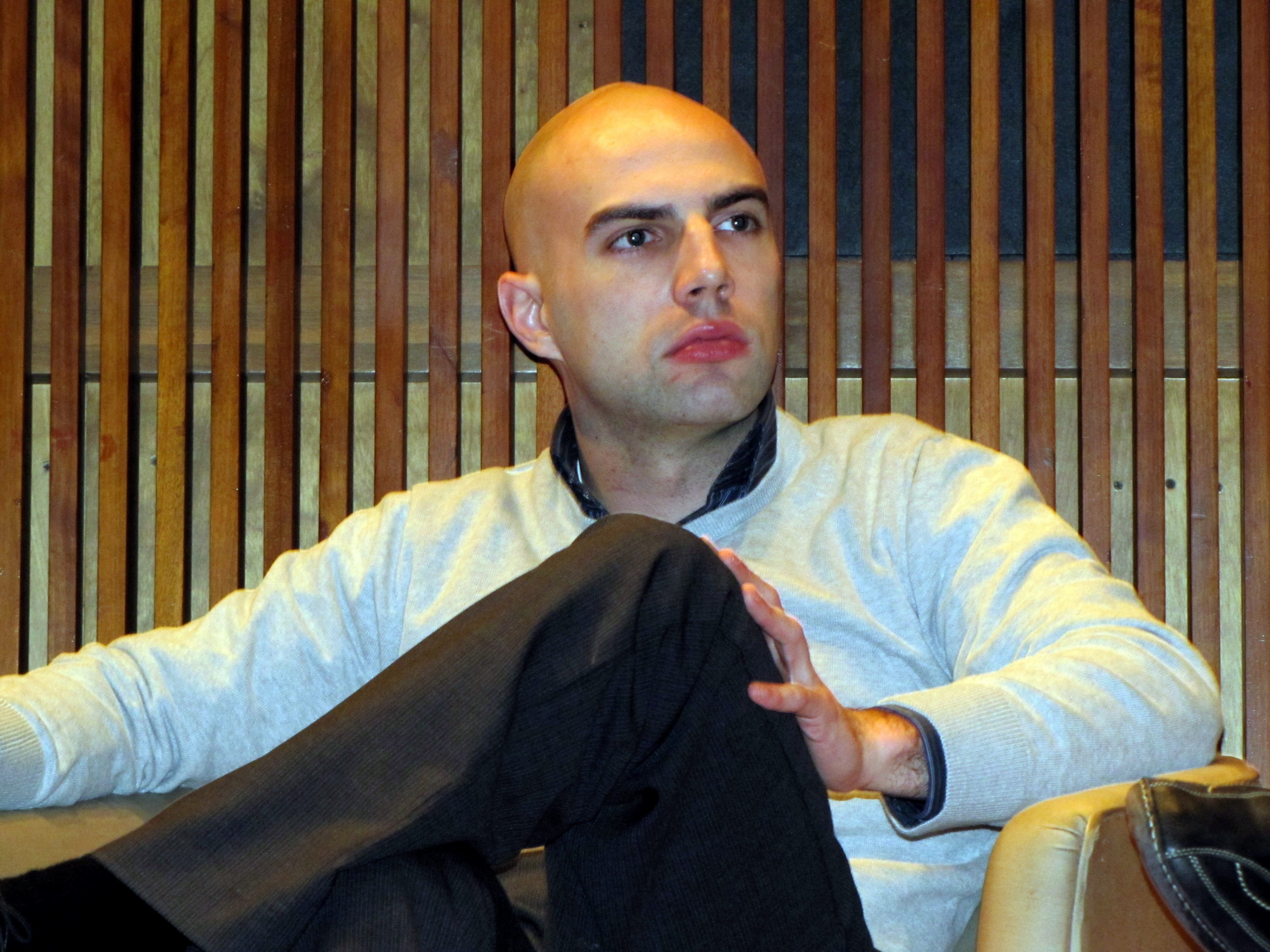 (cc) David Berkowitz